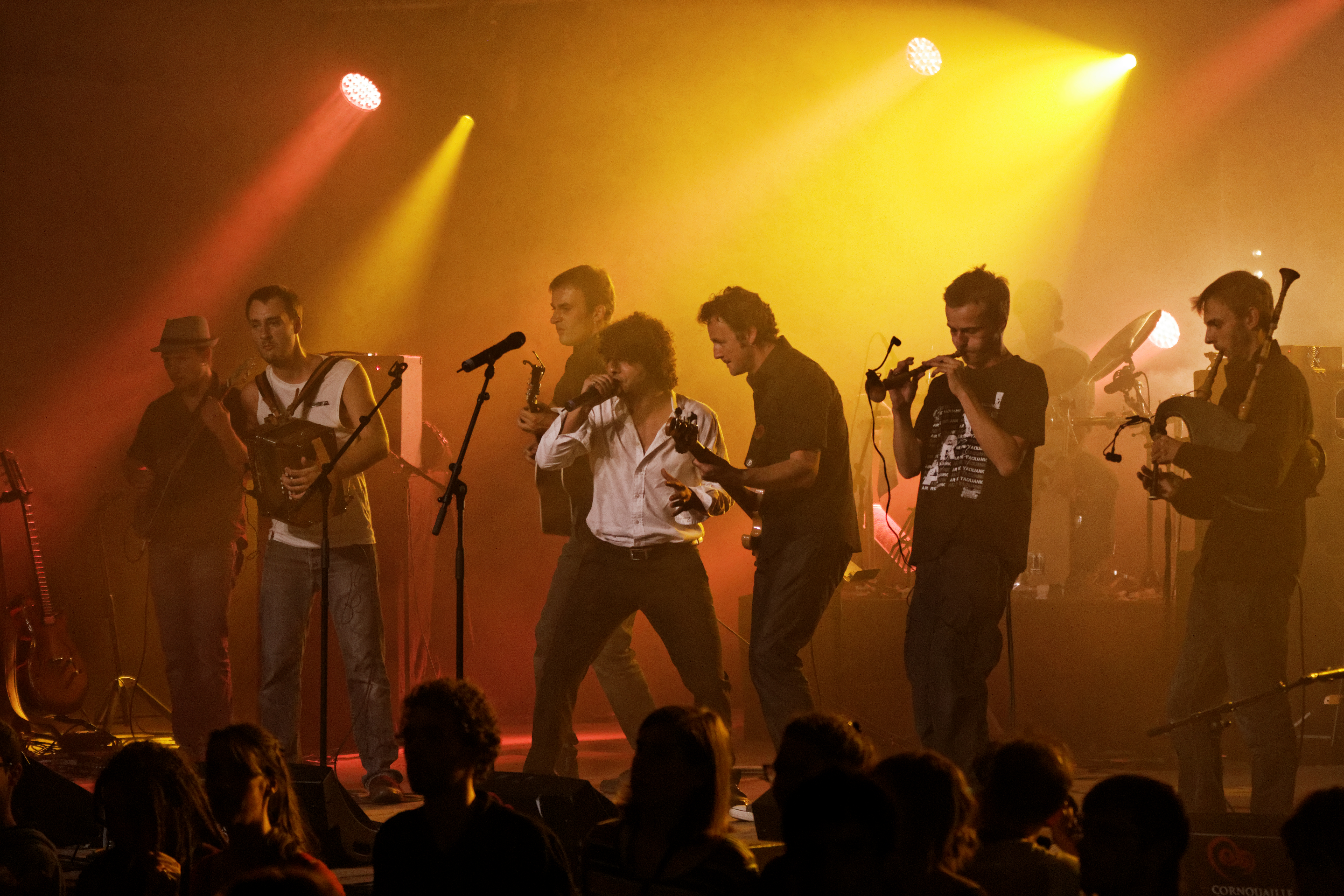 Startijenn en concert à l'espace évêché lors du festival de Cornouaille 2013.